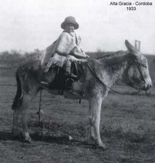 Ernesto Guevara. Alta Gracia. Córdoba. Argentina. 1933